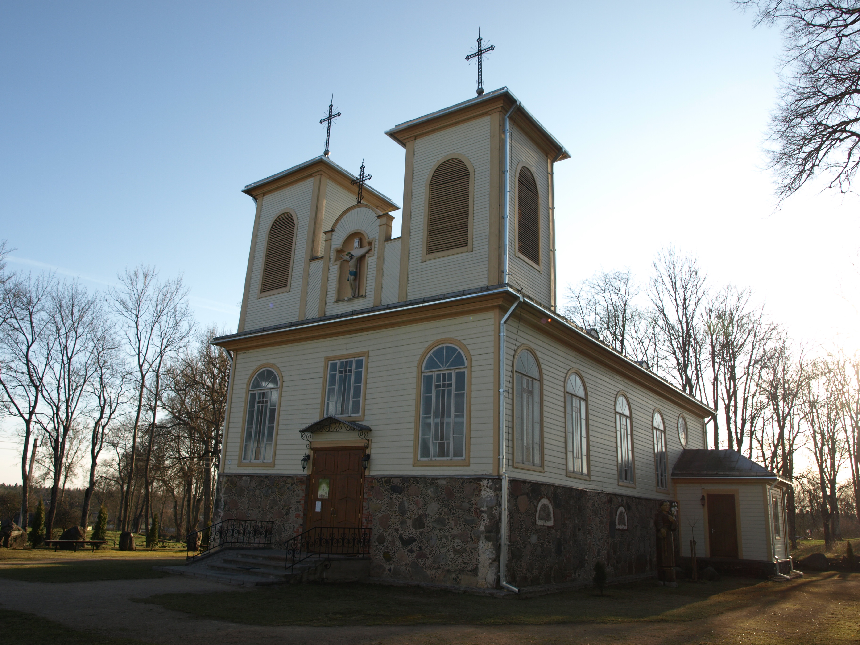 Saldutiskis church